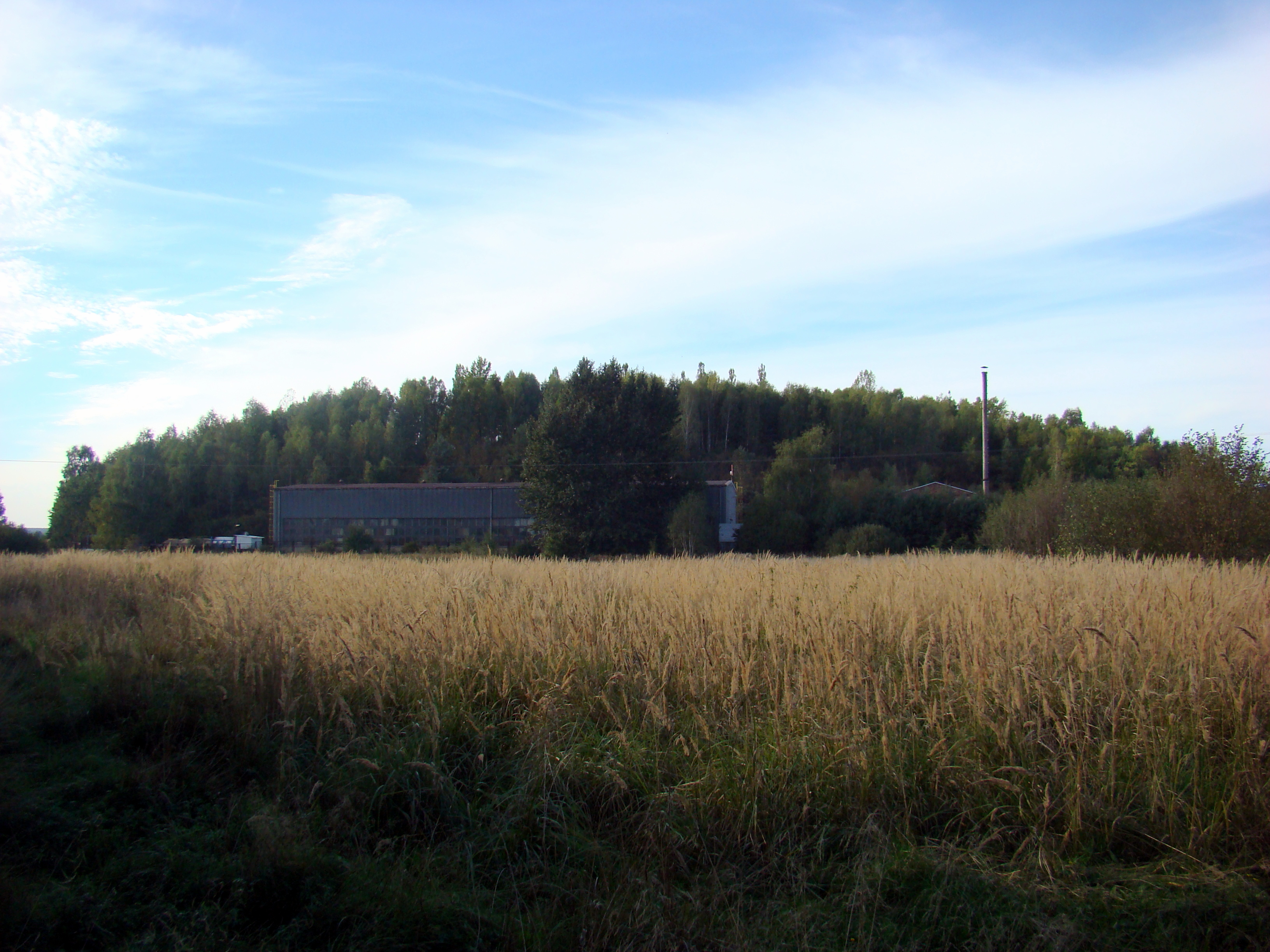 Hałda dawnej kopalni rud żelaza "Kuźnica" w Kuźnicy, Częstochowa.